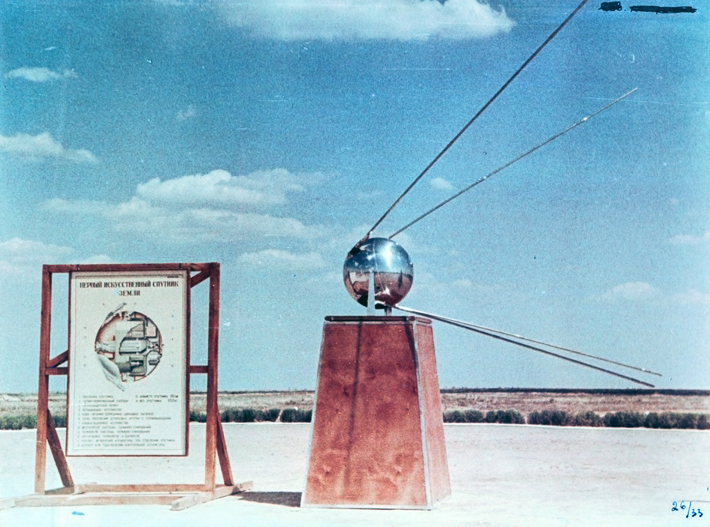 16 марта 1962 года Капустин Яр из ракетного полигона превратился в космодром. В тот день был осуществлен запуск спутника Космос-1. С космодрома Капустин Яр стартовали небольшие исследовательские спутники, для запуска которых использовались ракеты-носители небольшой мощности серии «Космос». На фото: Спутник-1